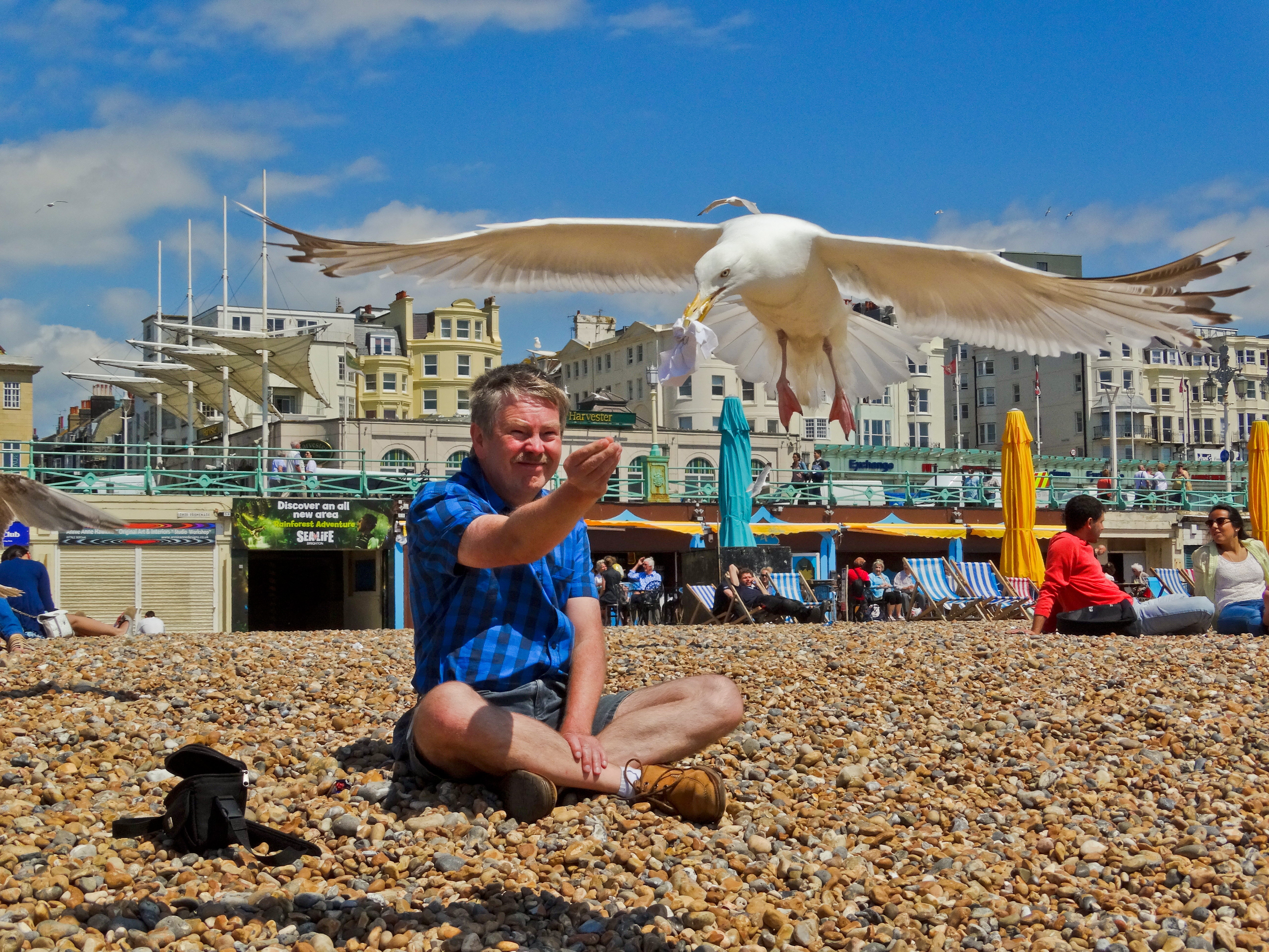 Silbermöwe raubt Eishörnchen am Strand von Brighton on Sea. Die Person bin ich selbst.